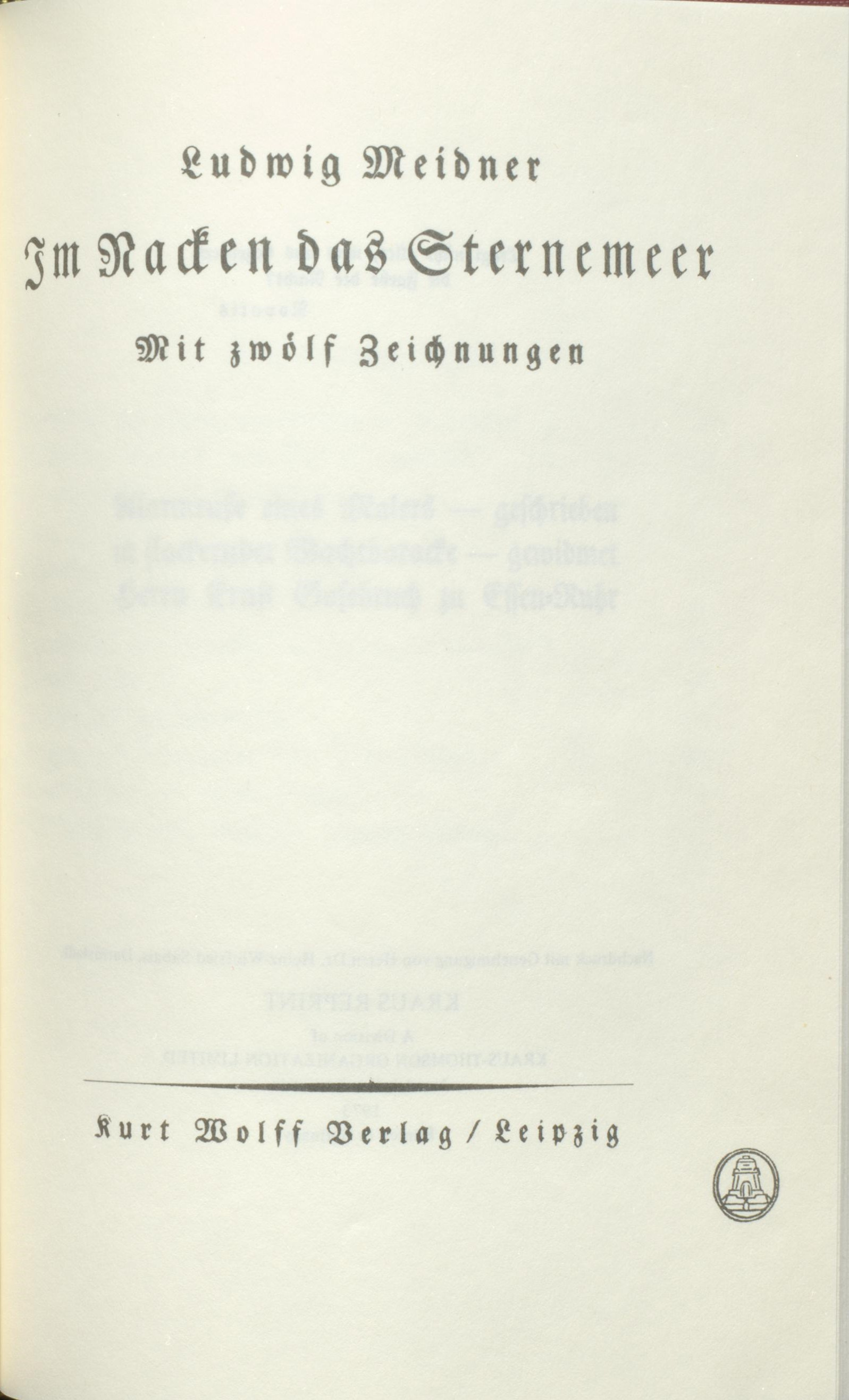 Ludwig Meidner Im Nacken das Sternemeer 1918 Titel